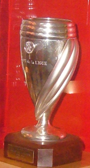 Premier trophée de la Coupe de la Ligue